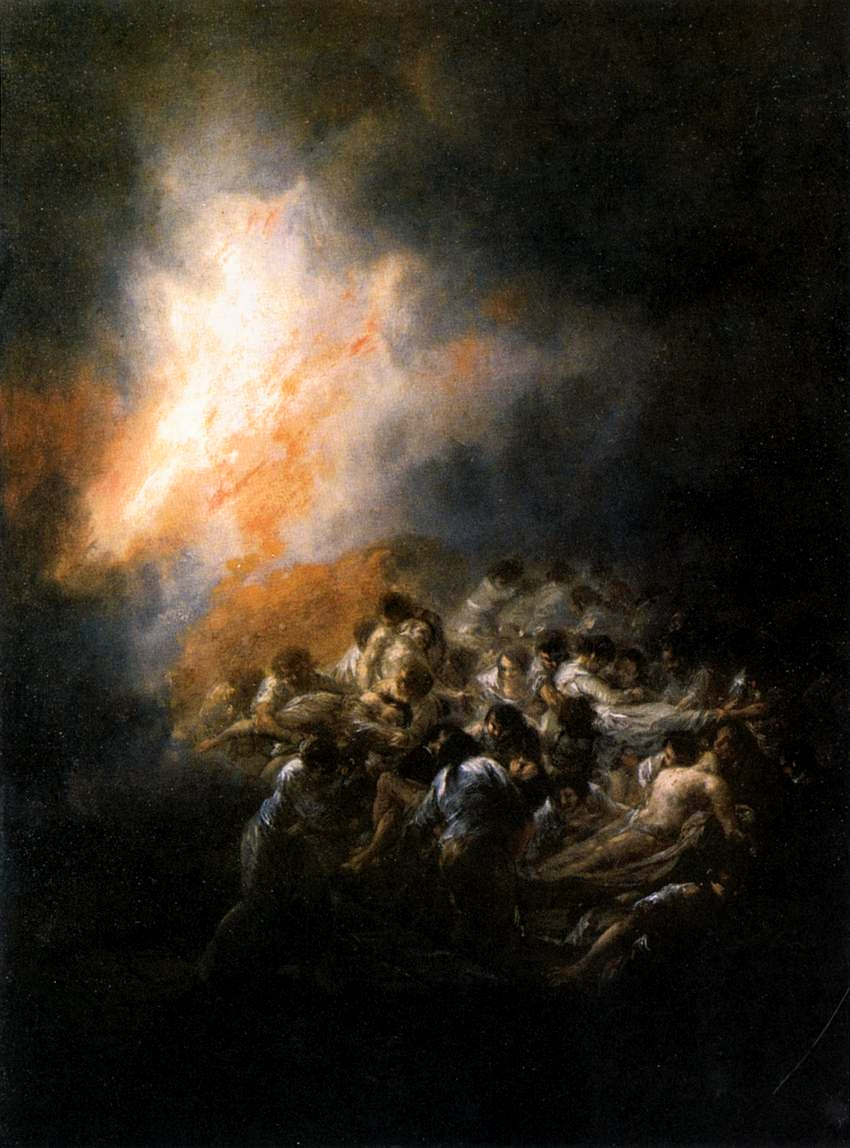 Incendio, fuego de noche. Óleo sobre hojalata. 43 x 32 cm. Colección José Varez (San Sebastián, España).